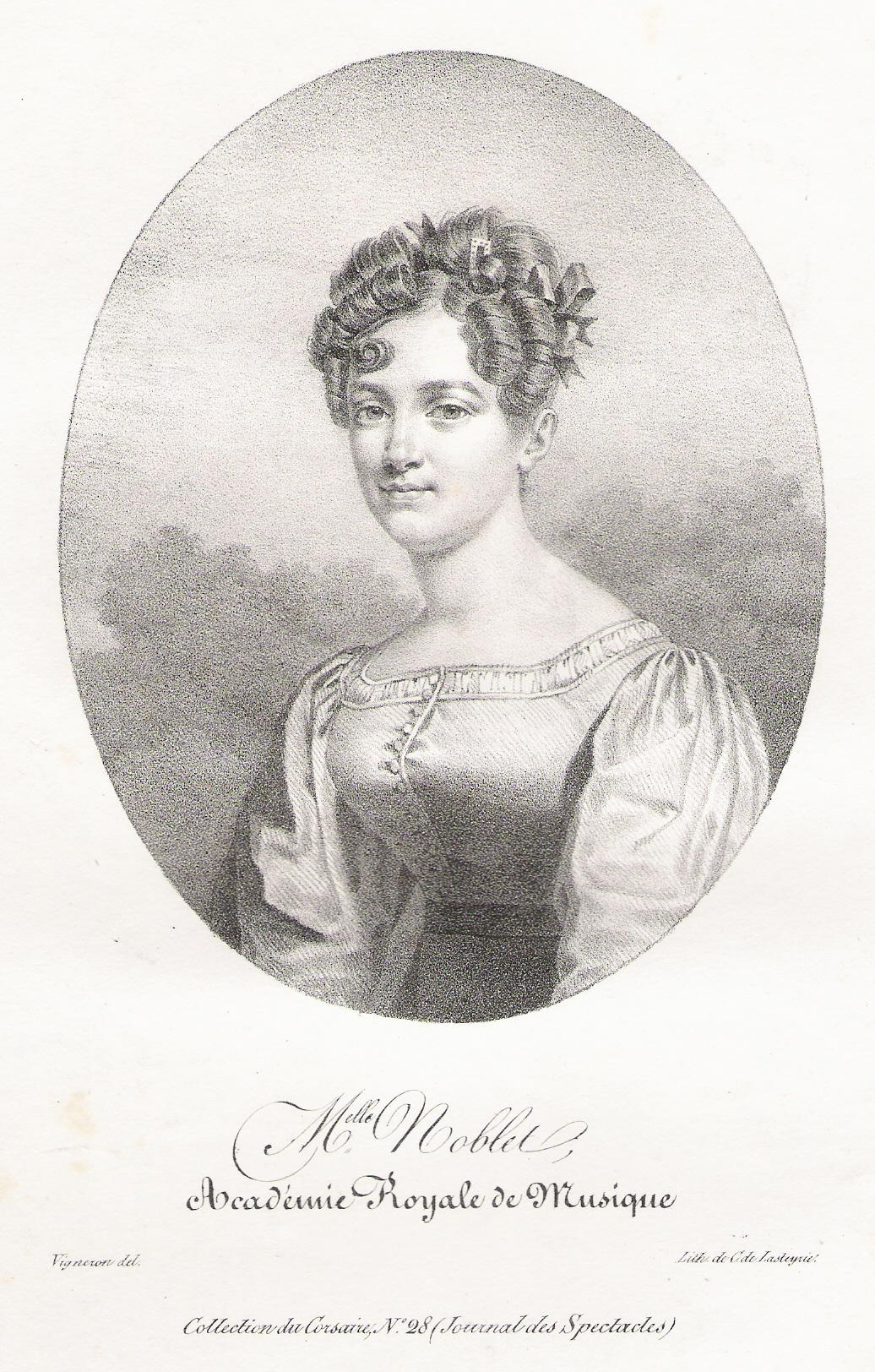 Lise Noblet, danseuse (vers 1835), collection privée